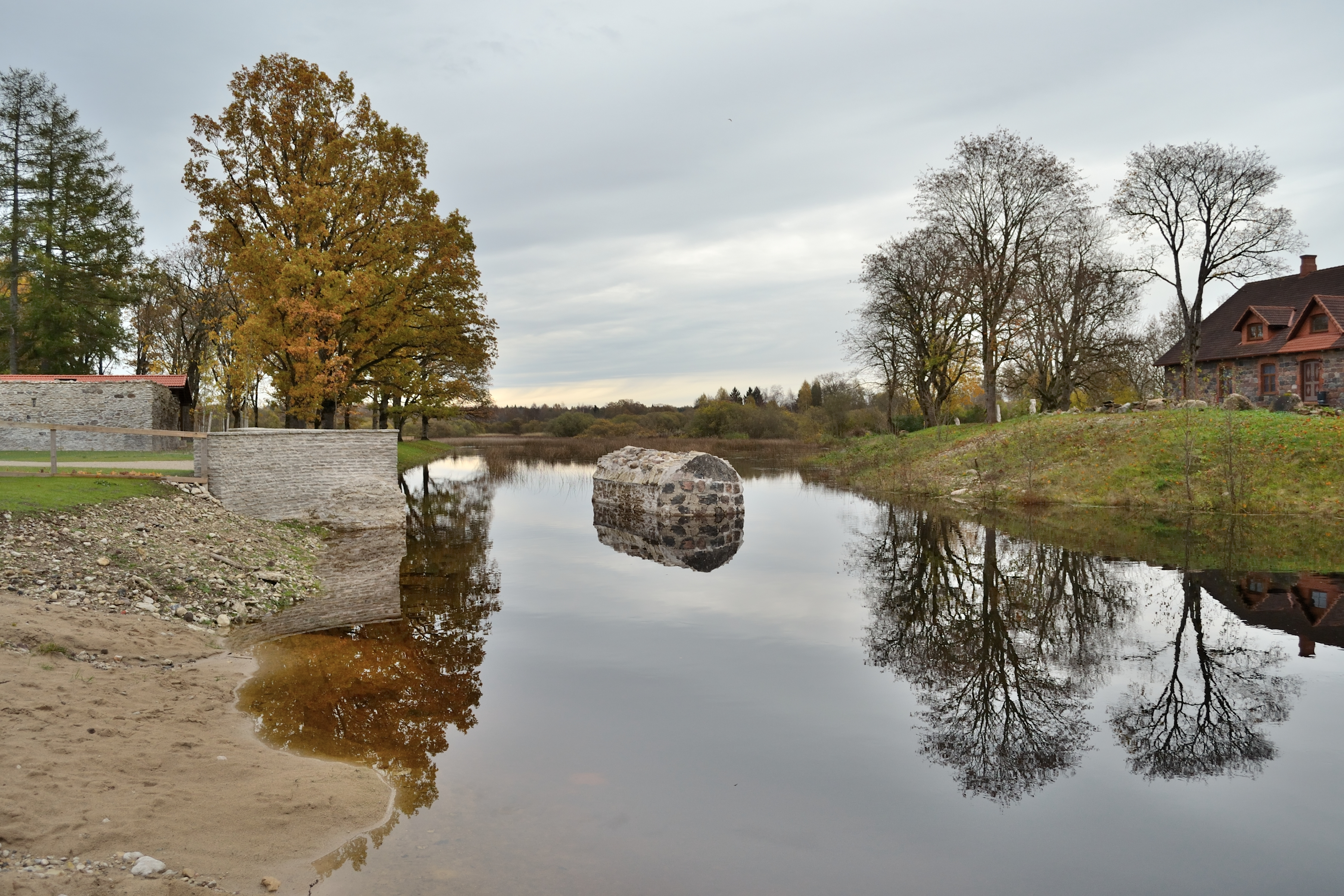 Pajaka mõisa viiva endise silla asukoht Kasari jõel